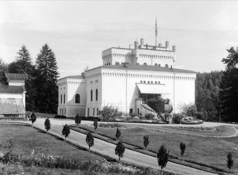 Bærums verk, ca. 1935